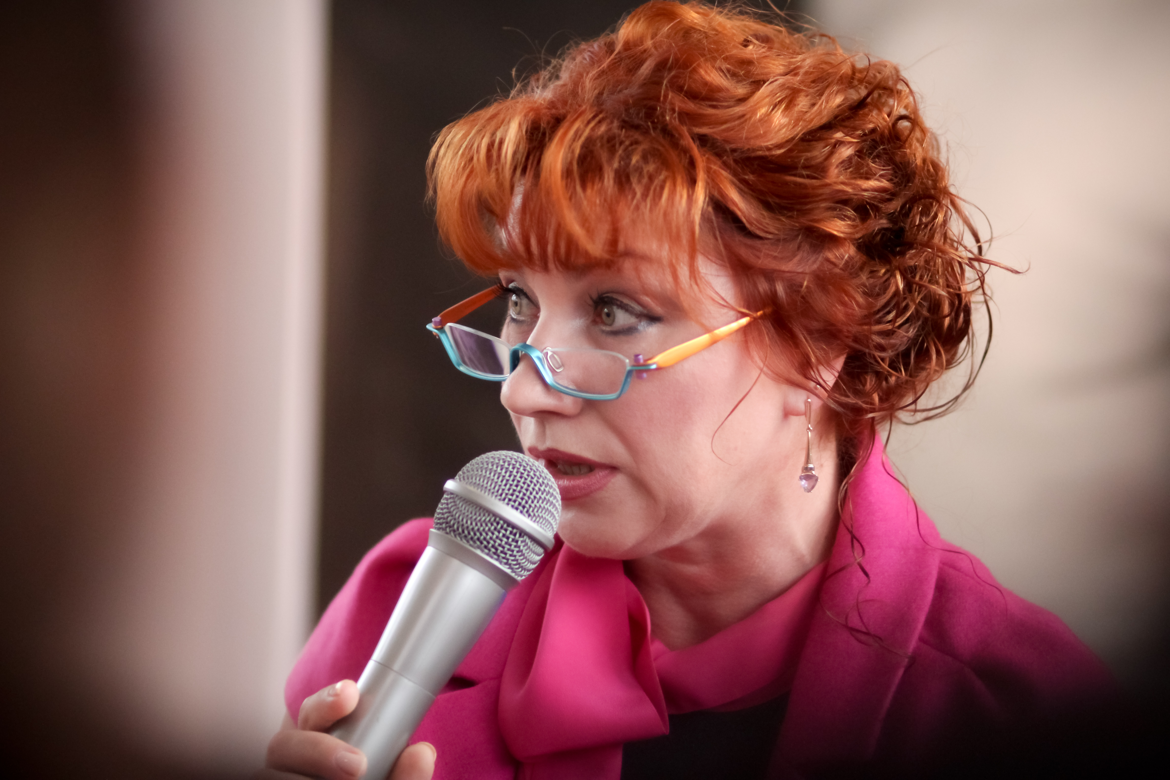 Роза Сябитова на ММКВЯ-2010